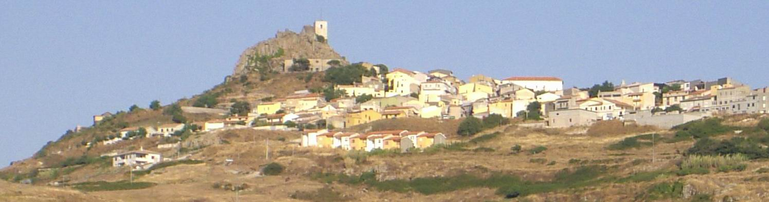 Panorama di Osilo con castello, visto dalla Strada per l'Anglona